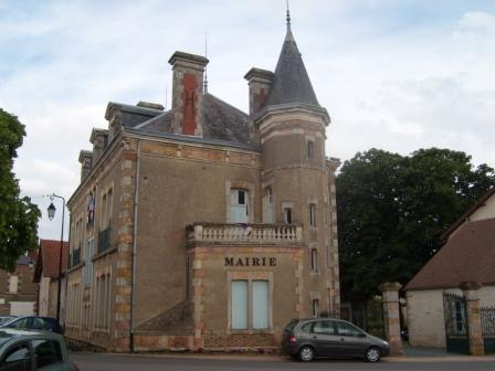 Mairie de Vesdun